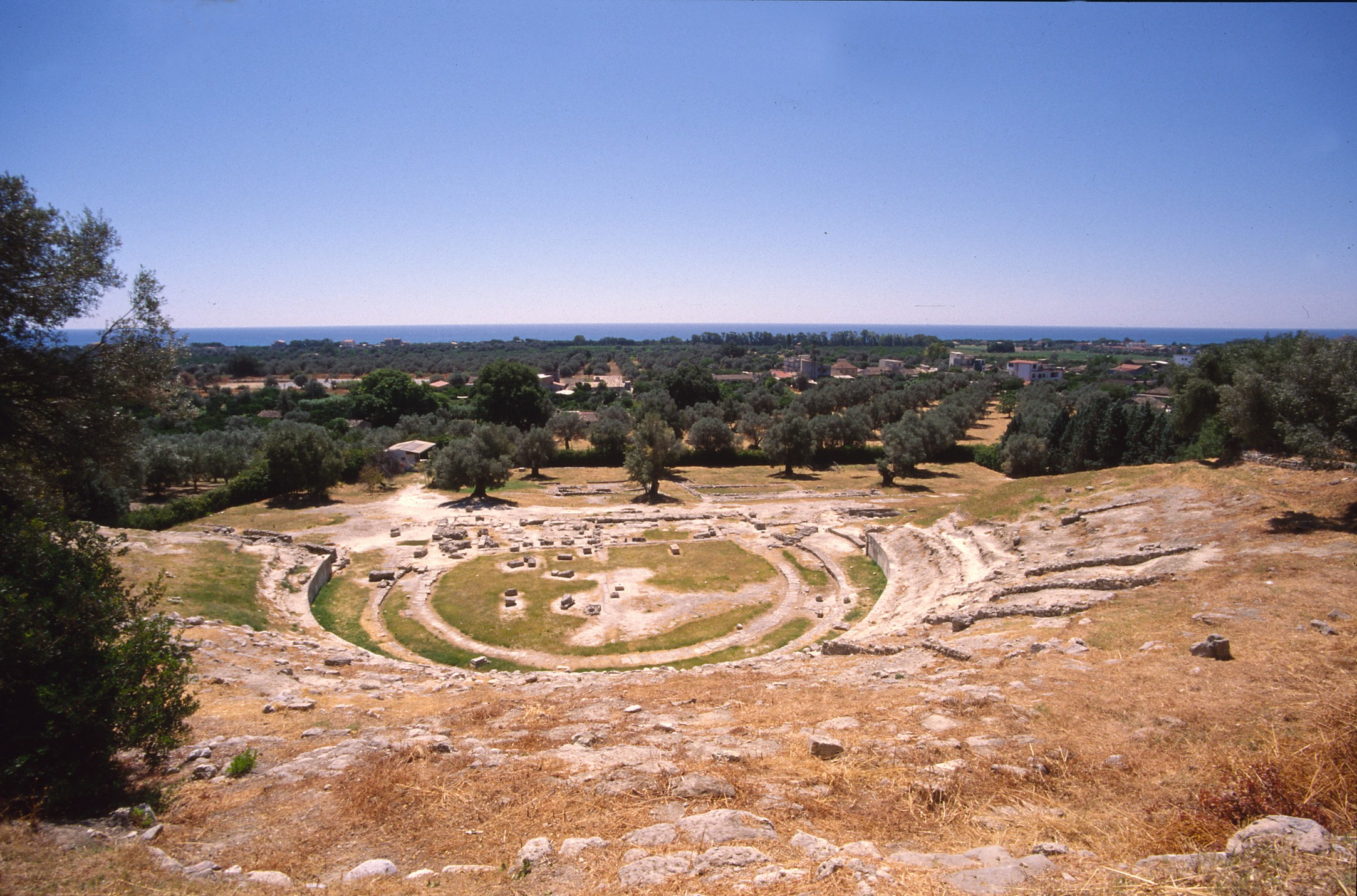 Locri Epizefiri, il teatro greco romano nel 1996.